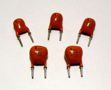 Sal-Kondensatoren